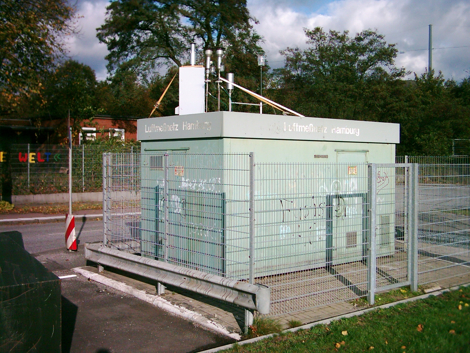 Meßstation Luftmeßnetz Hamburg, Hamburg-Veddel.